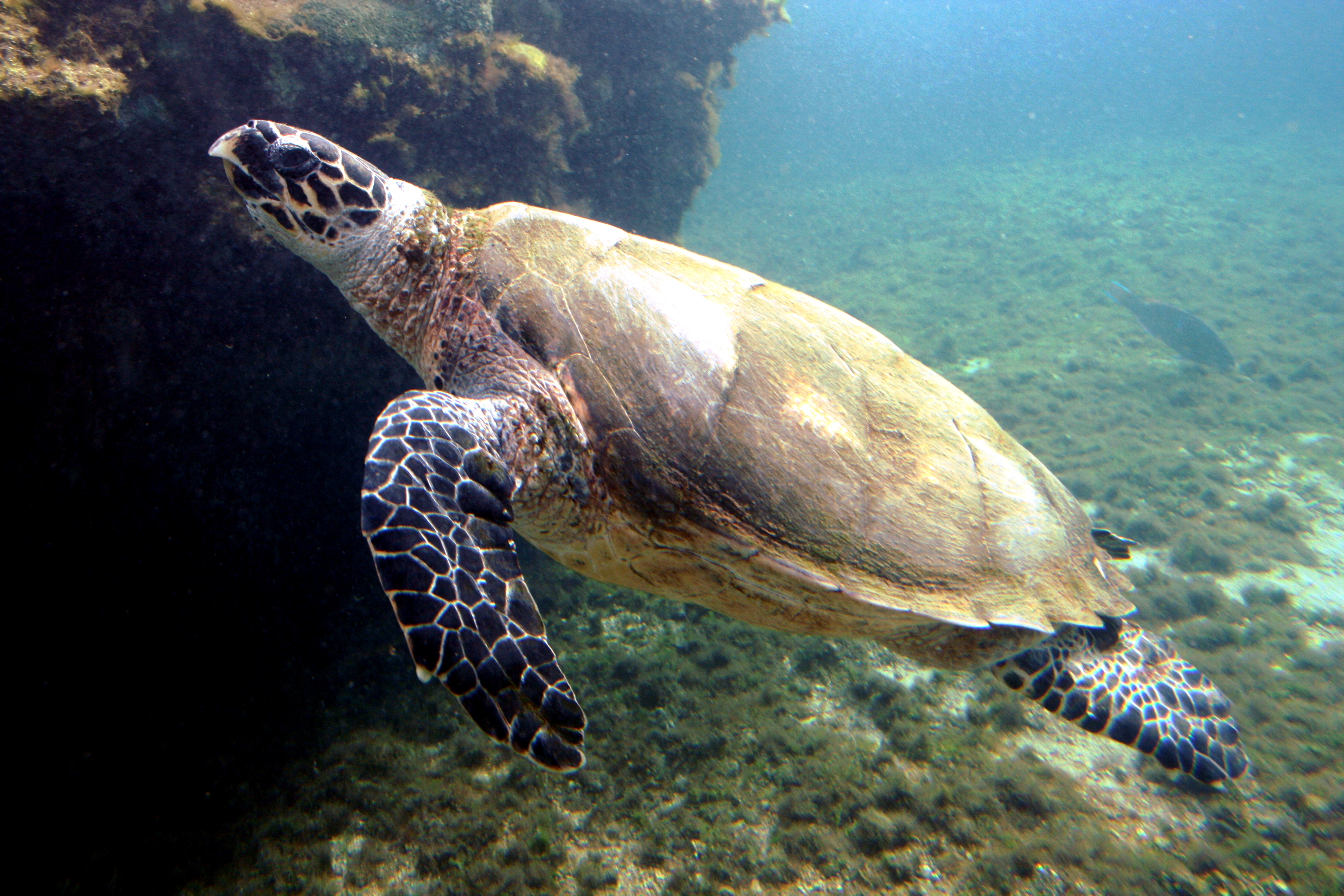 Tortue imbriquée à Kélonia